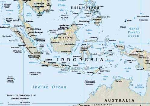 Indonesischer Archipel